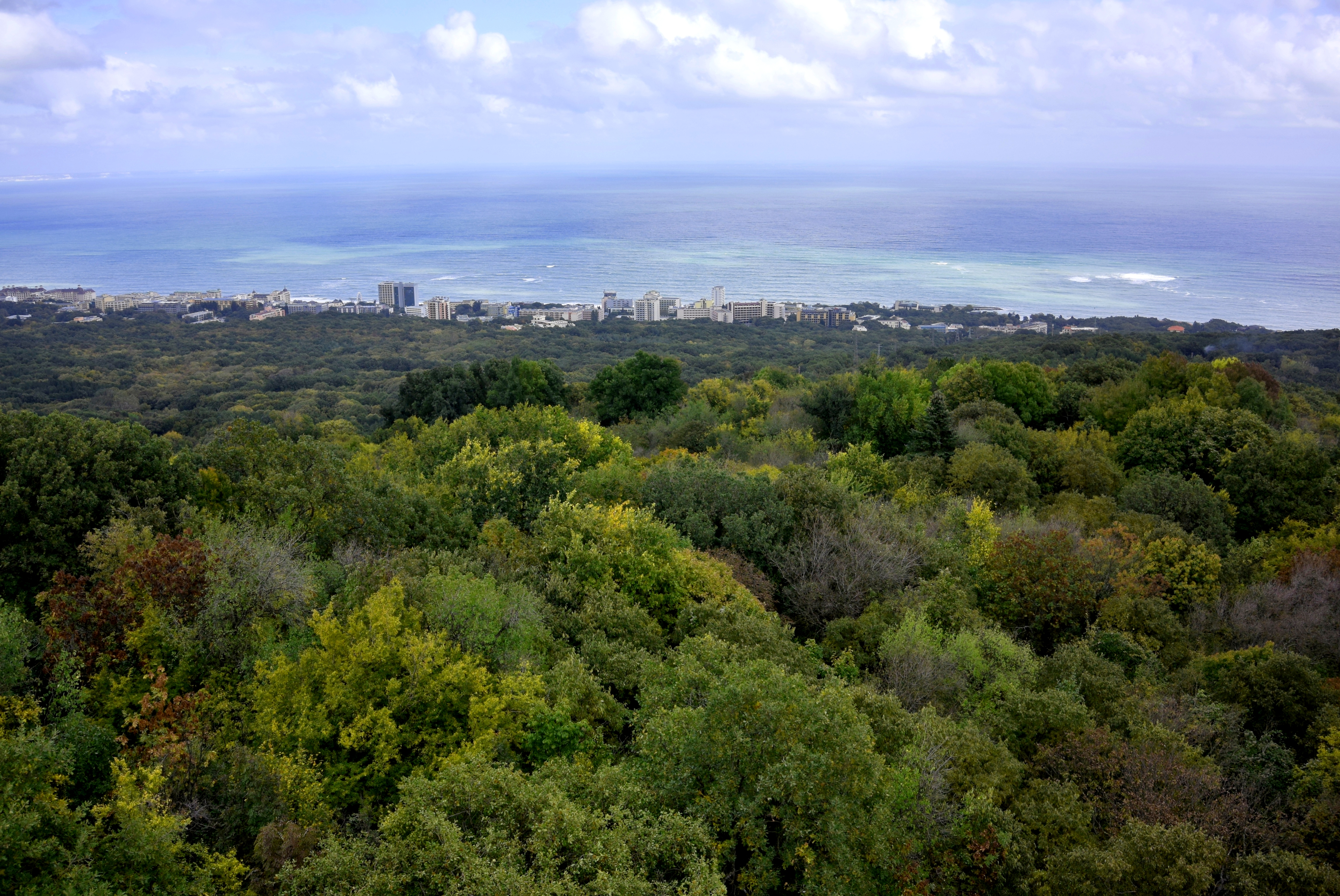 Златни пясъци